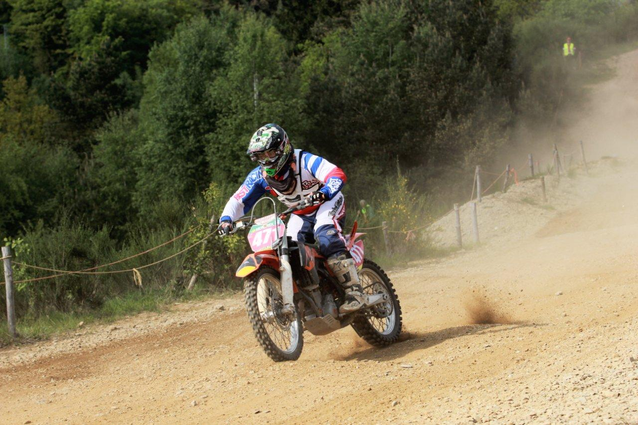 DE Gilles Hermes um Cross zu Mellier 2013